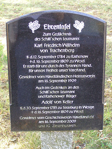 Gedenktafel für die erschossenen Offiziere des Schill'schen Freikorps von Trachenberg und von Keller am Kirchplatz in Rathenow